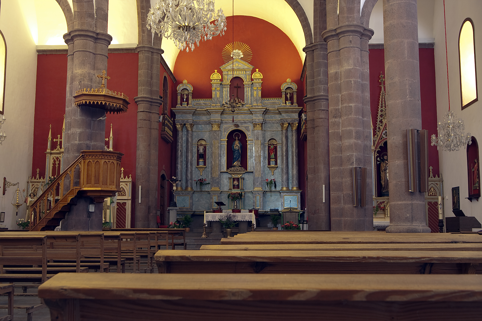 Innenraum